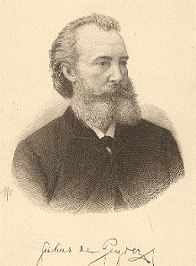 Prent (kopergravure), portret van Julius De Geyter door Jan Baptist P. Michiels (1821-1890)